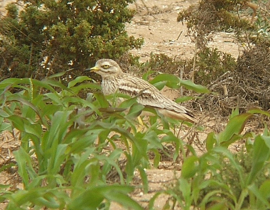 Burhinus oedicnemus, near Tamri, Morocco, 17 April 2006